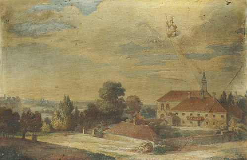 Wallfahrtskirche und Eremitorium St. Emmeram bei Oberföhring, Ölgemälde nach einem Kupferstich von Simon Warnberger, 1805